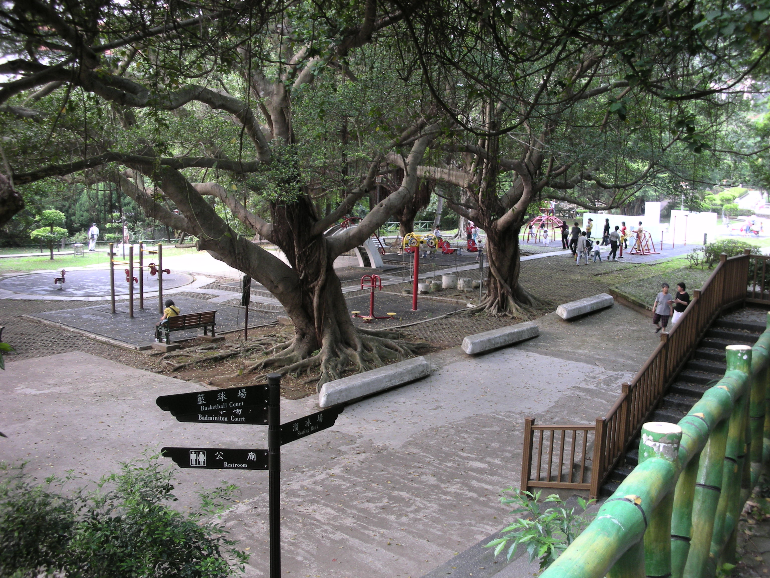 天母公園 Tianmu Park